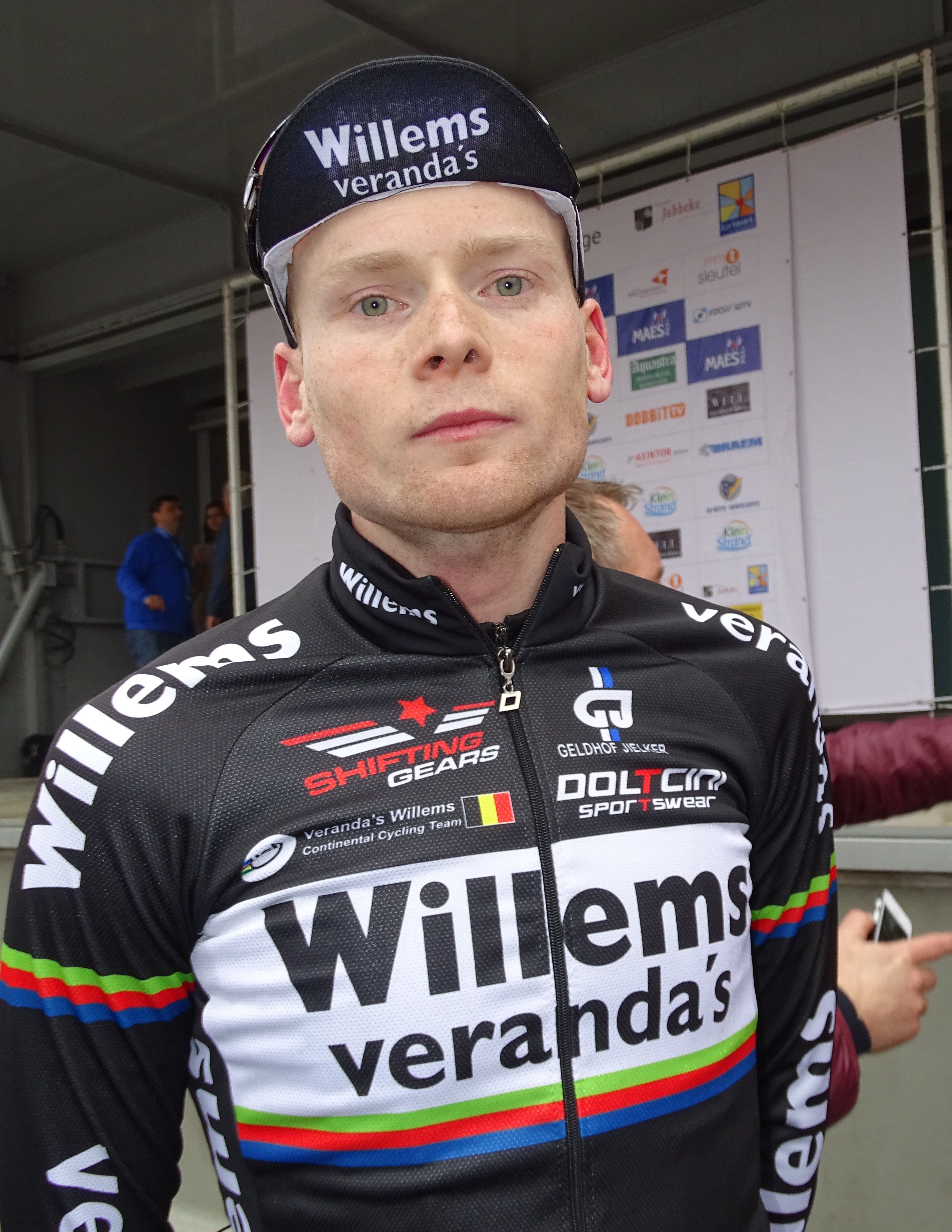 Reportage réalisé le vendredi 20 mars à l'occasion de l'arrivée de la Handzame Classic 2015 à Bredene (Kortemark), Belgique.